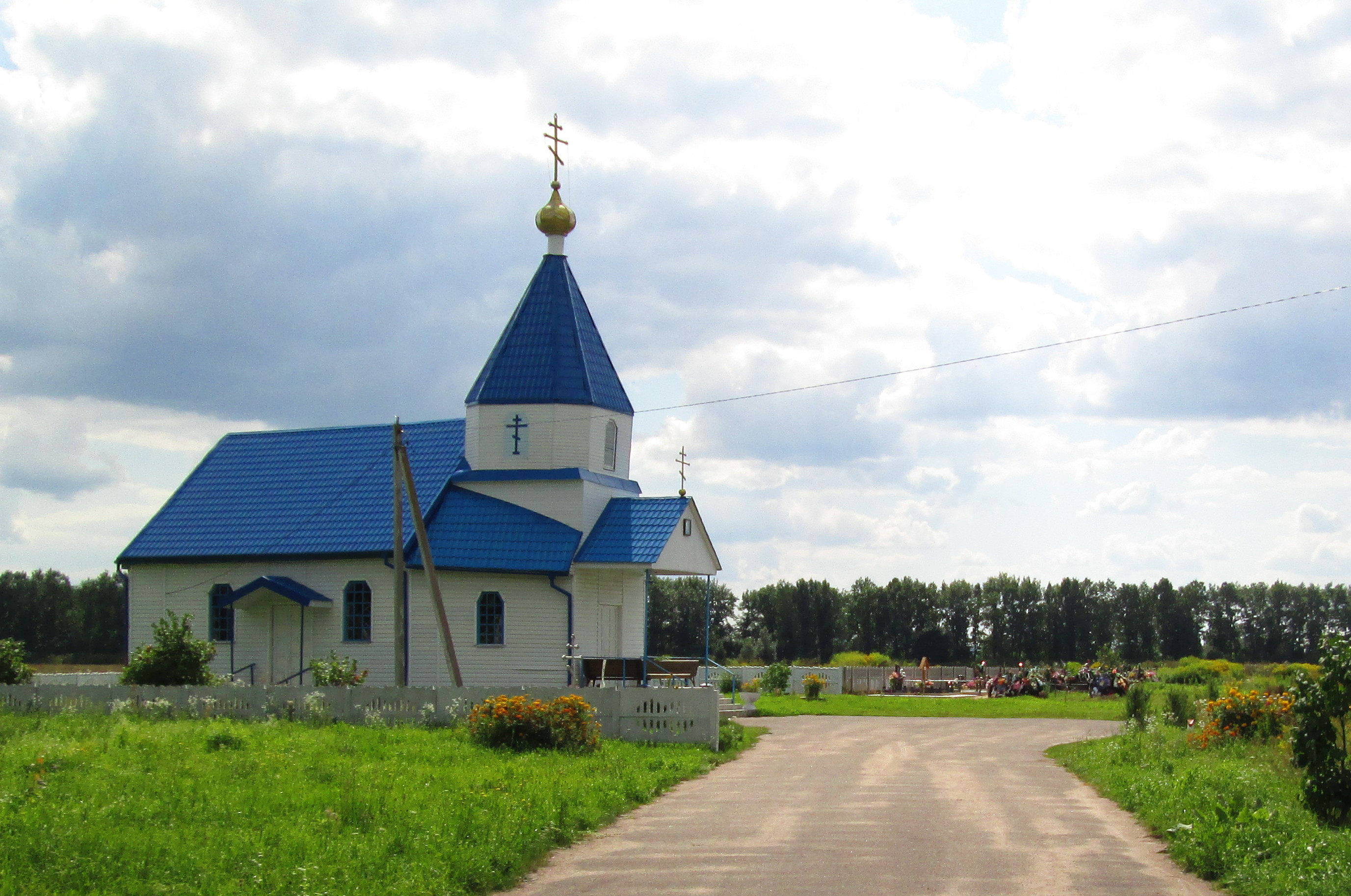 Turec-Bajary, Belarus